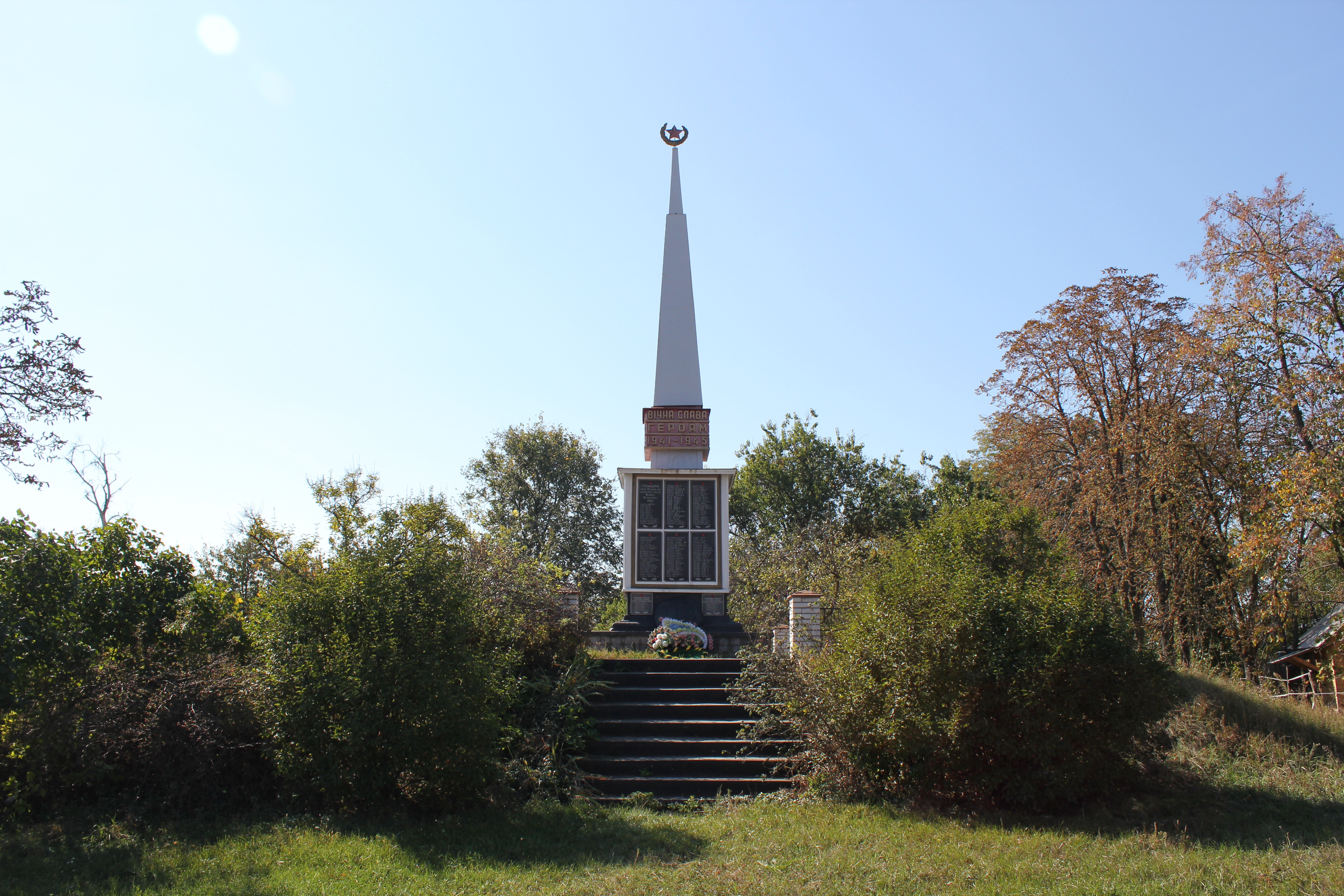 Пам'ятник воїнам-односельцям, які загинули в роки Великої Вітчизняної війни, село Хоцьки, біля будинку культури